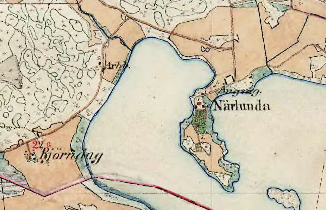 Närlunda, Björnäng och omgivning på Häradsekonomiska kartan